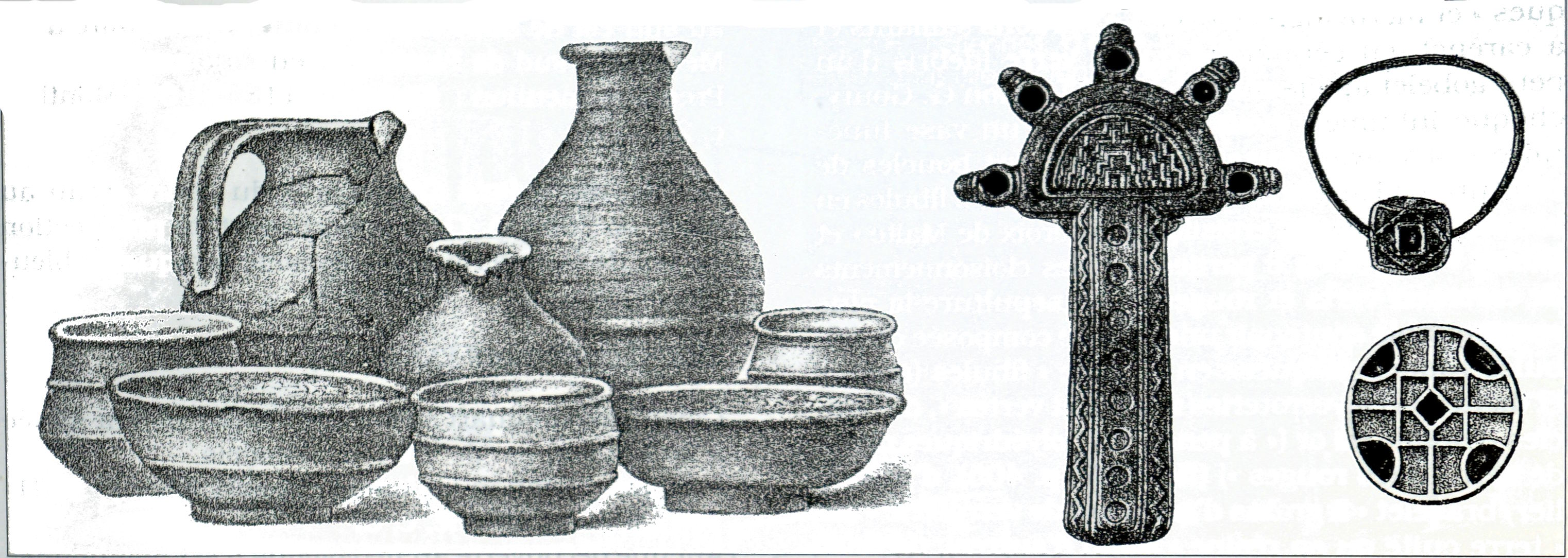 découverte archéologique faite à Rosay.